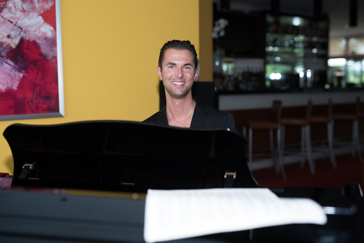 Dr.Konstantinos Kalogeropoulos, Rechte zur Freigabe bei mir.